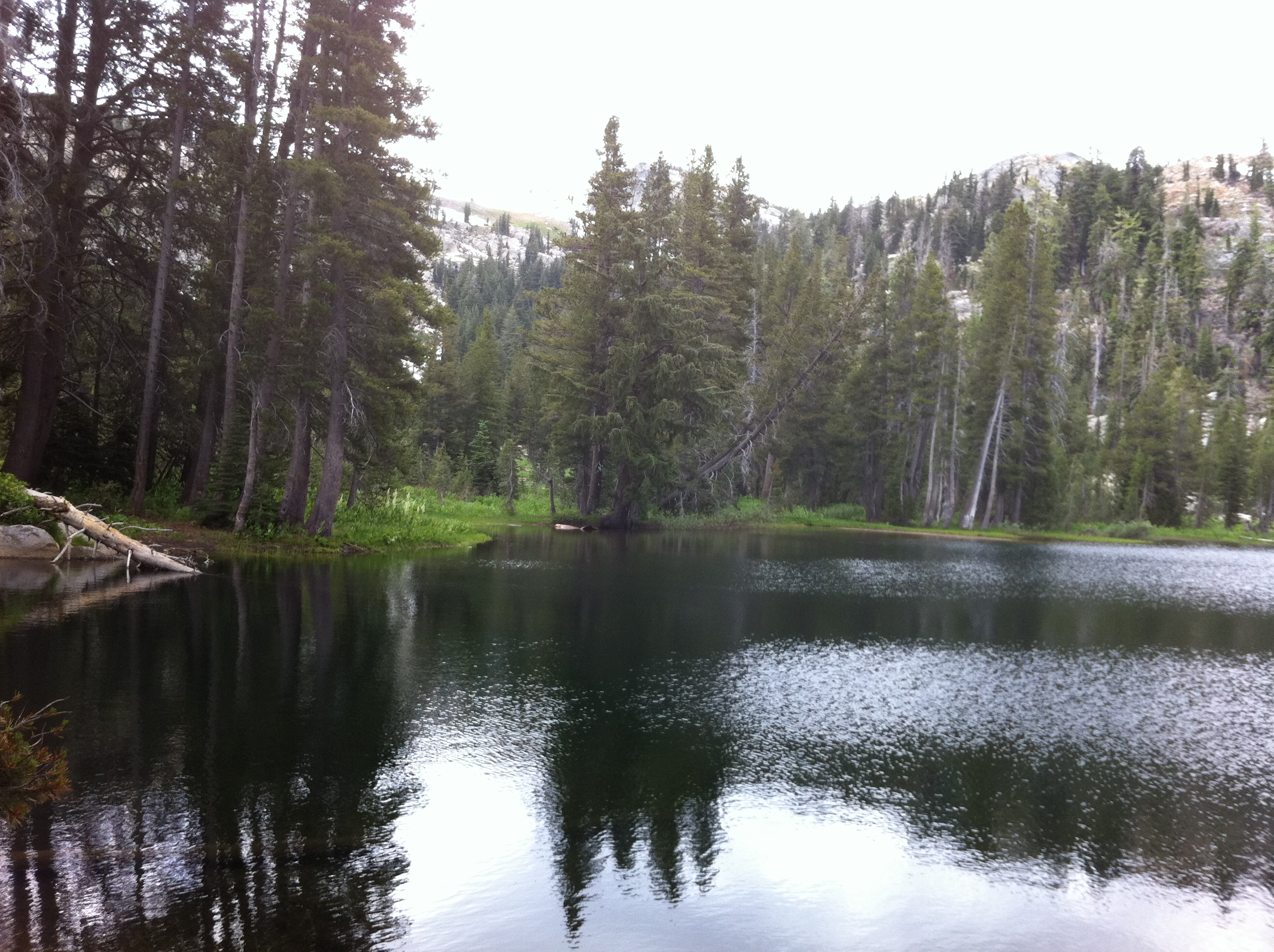 Bull Run Lake, Carson-Iceberg Wilderness, CA